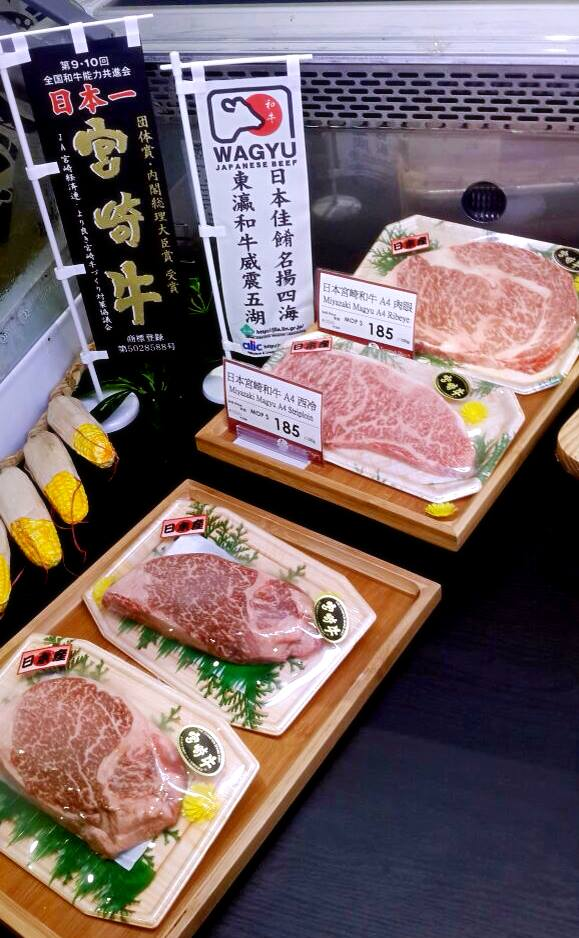 マカオのグランドマートの冷蔵庫。写真は宮崎から直送ビーフ。